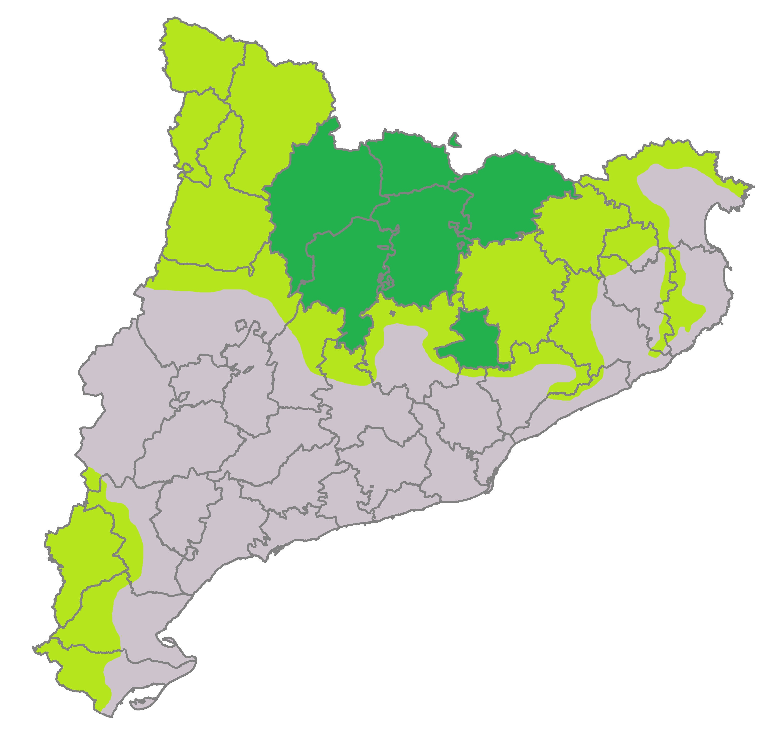 Comarques amb la presència del llop (verd ford). Projecció de la presència del llop l'any 2050 (verd fluix).